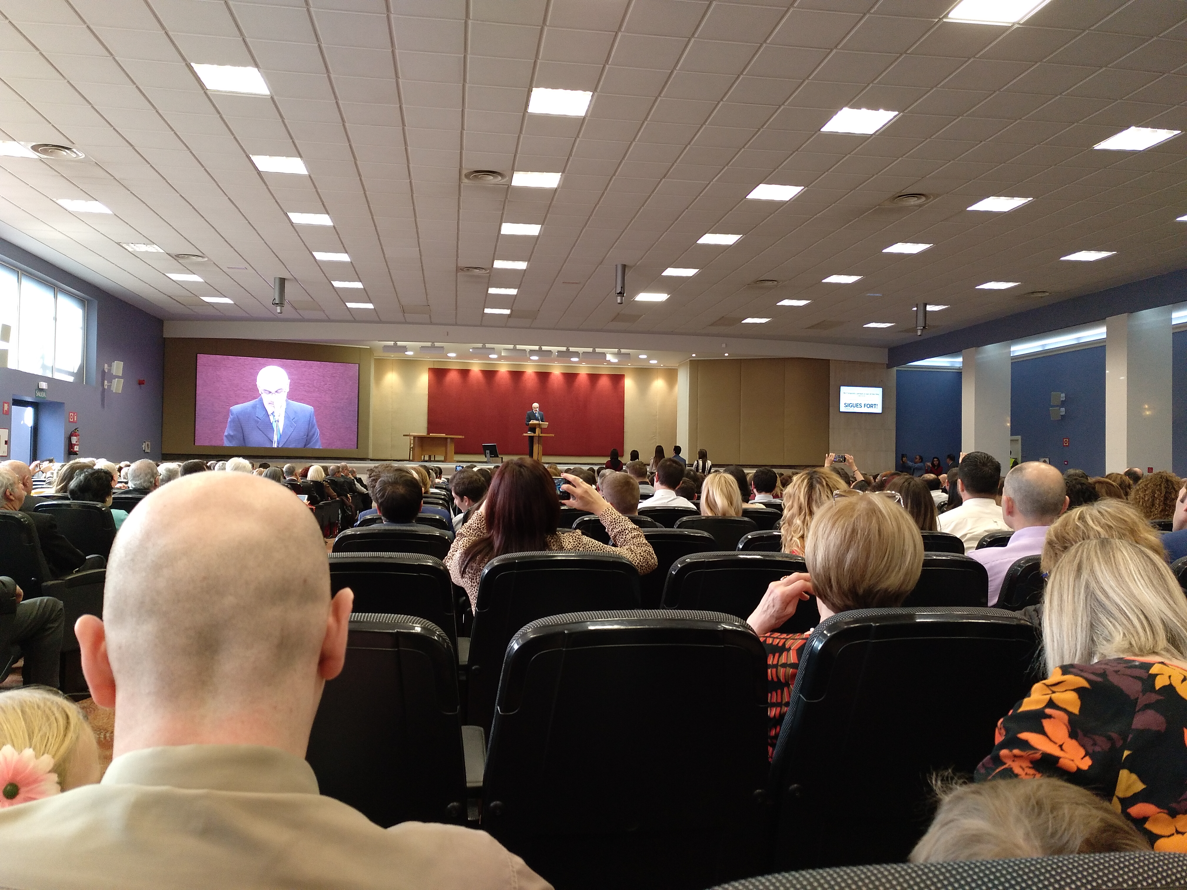 Congrés de Circuit dels Testimonis de Jehovà, l'any 2019 a la Sala de Congressos de Sant Quirze del Vallès, propietat de l'organització .jpeg